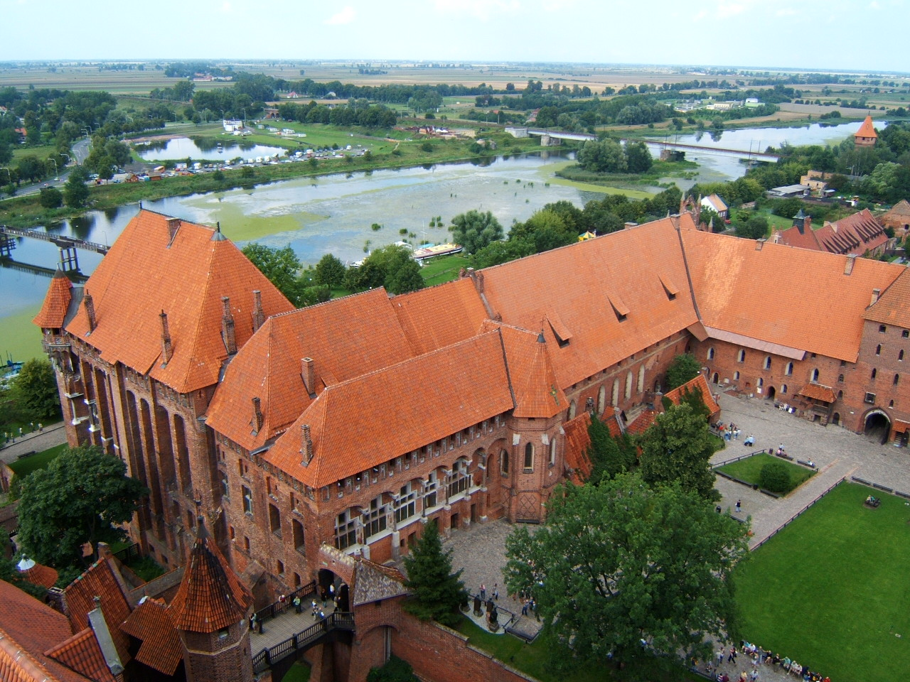 Zamek średni z pałacem Wielkiego Mistrza w Malborku. Widok z wieży zamku wysokiego.